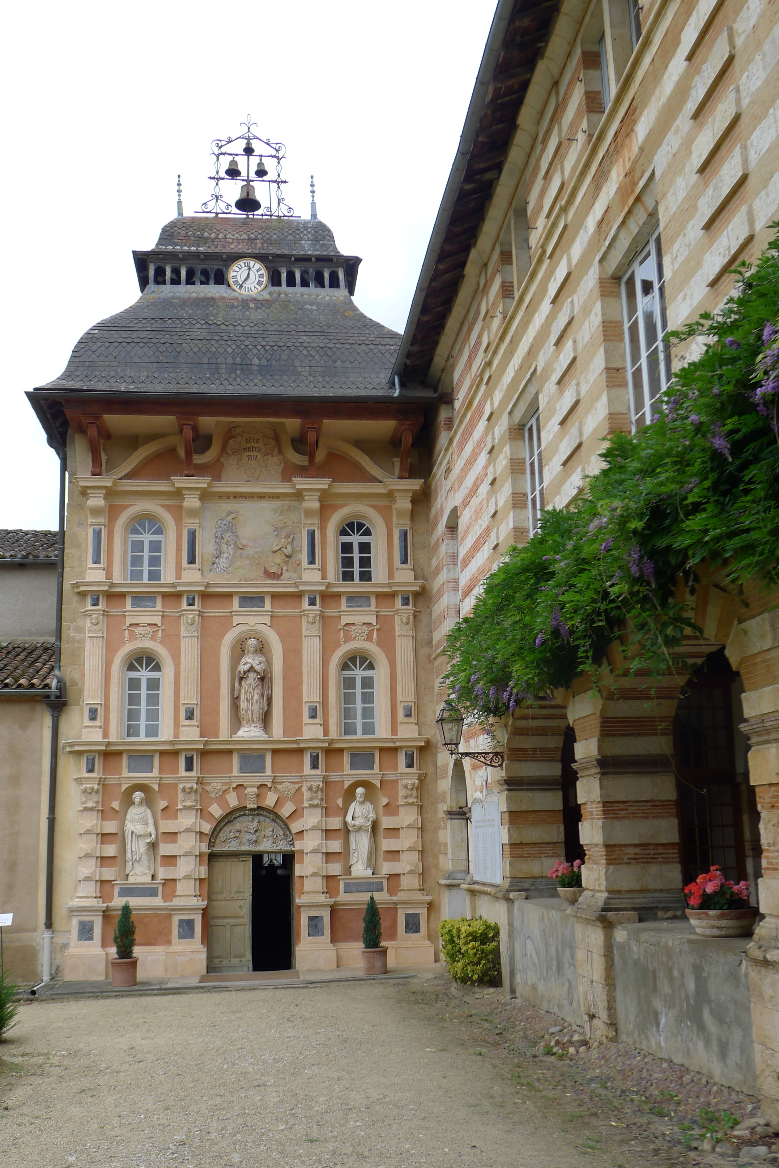 Entrée de la chapelle de Notre-Dame-de-la-Garaison